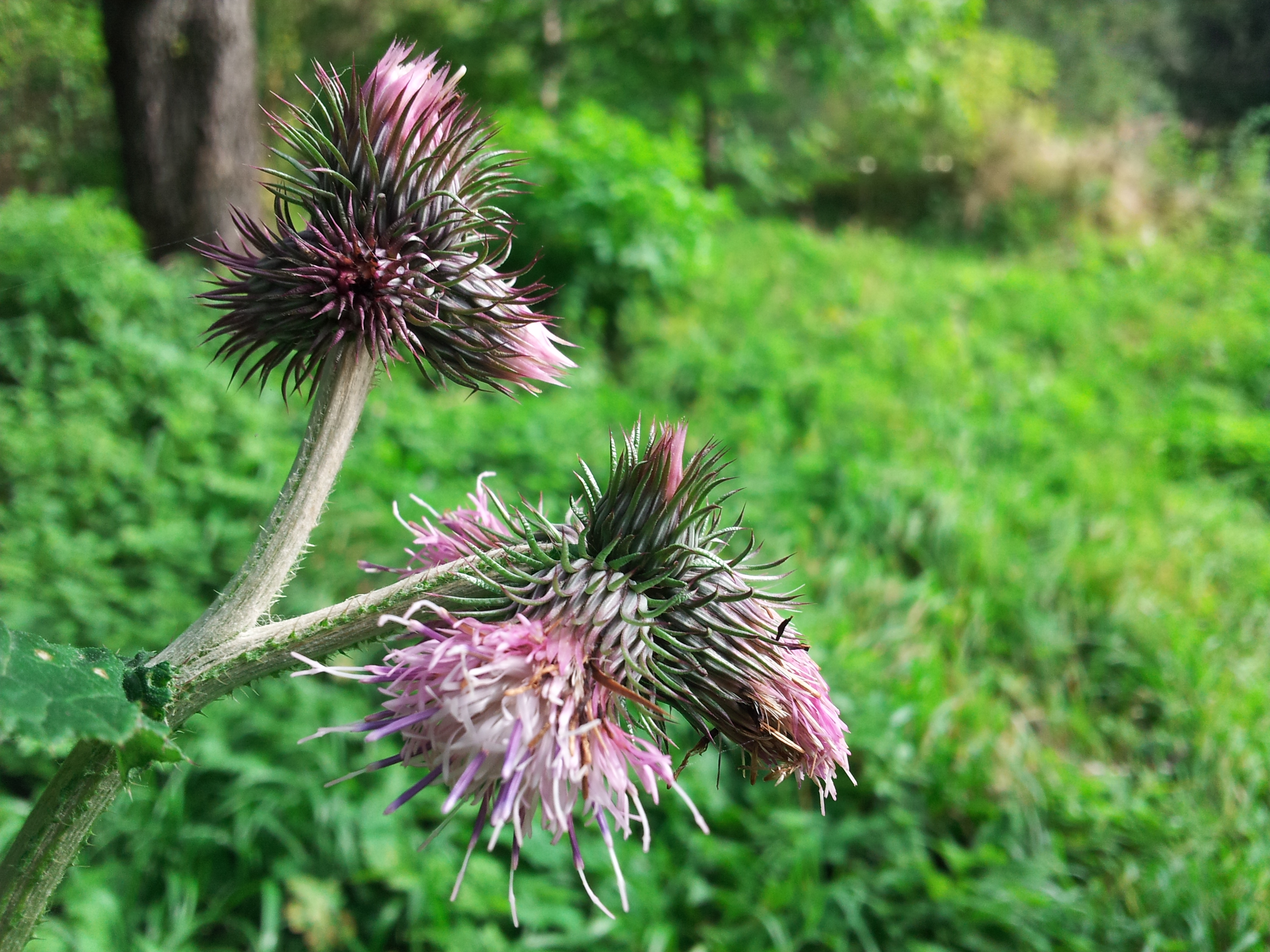 Ово је фотографија заштићеног природног добра у Србији под шифром: ПИО23This is a a photo of a natural area in Serbia with ID: ПИО23